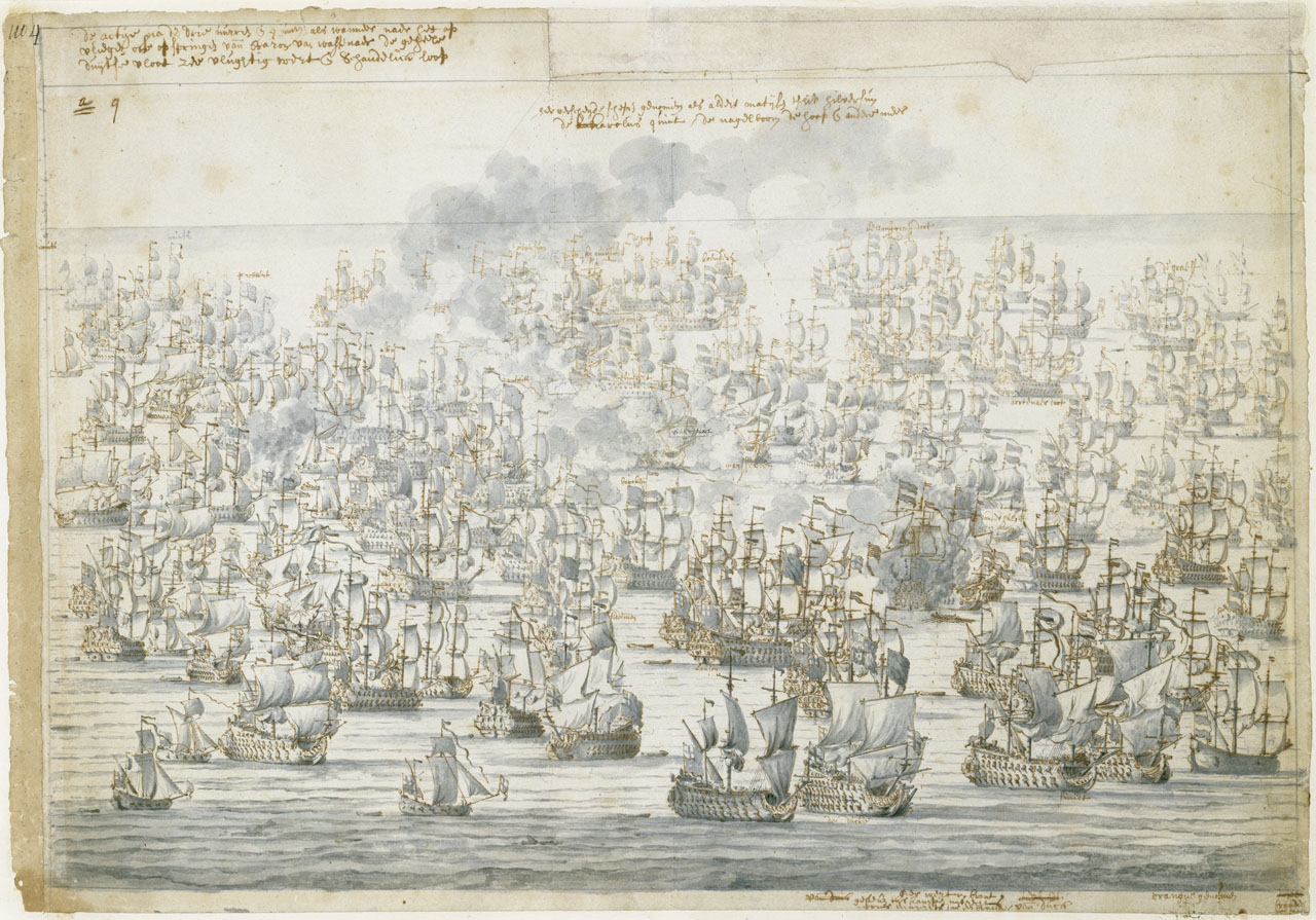 Skizze der Seeschlacht vor Lowestoft 1665 nach der Explosion der Eendracht